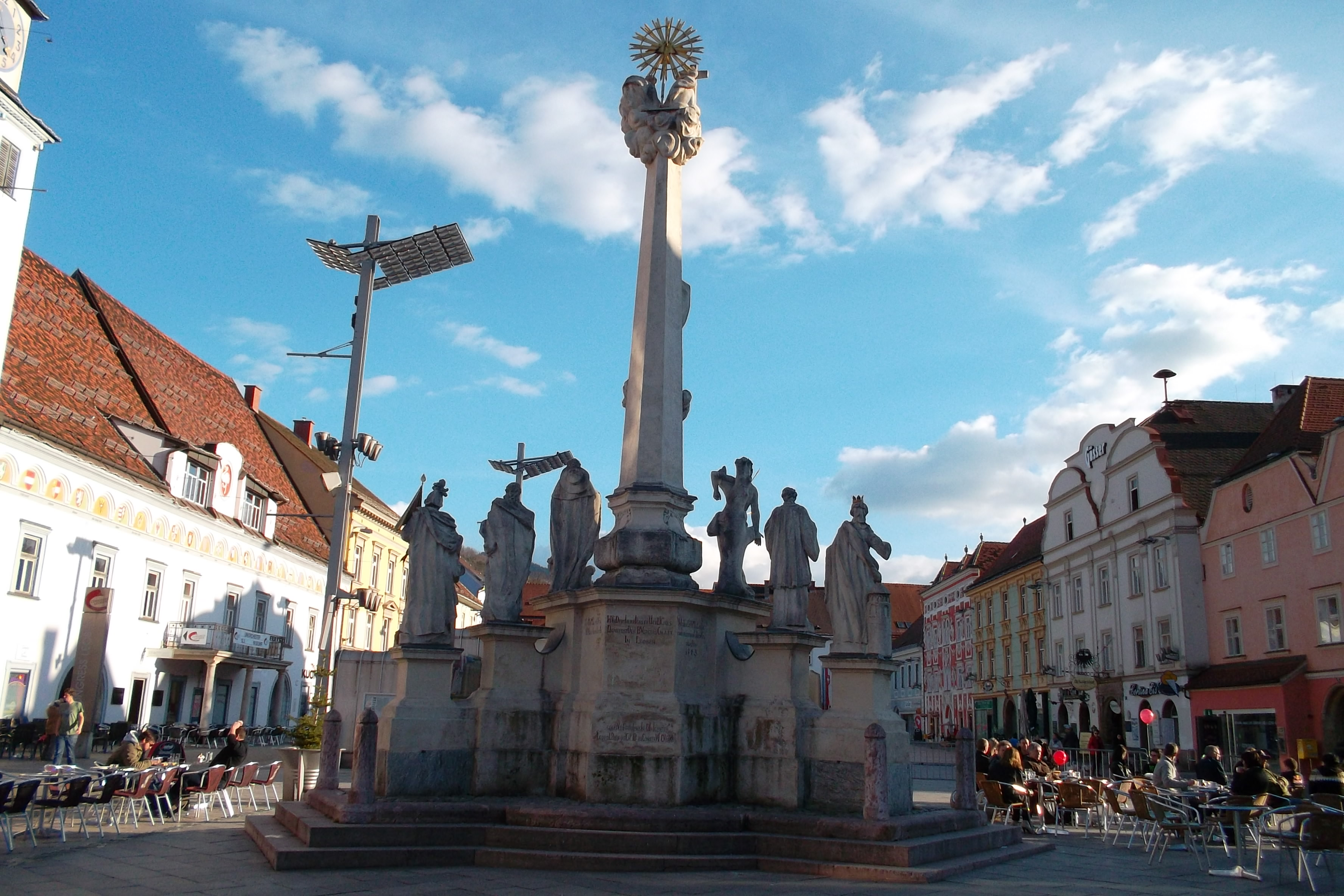 Pestsäule am Hauptplatz in Leoben.